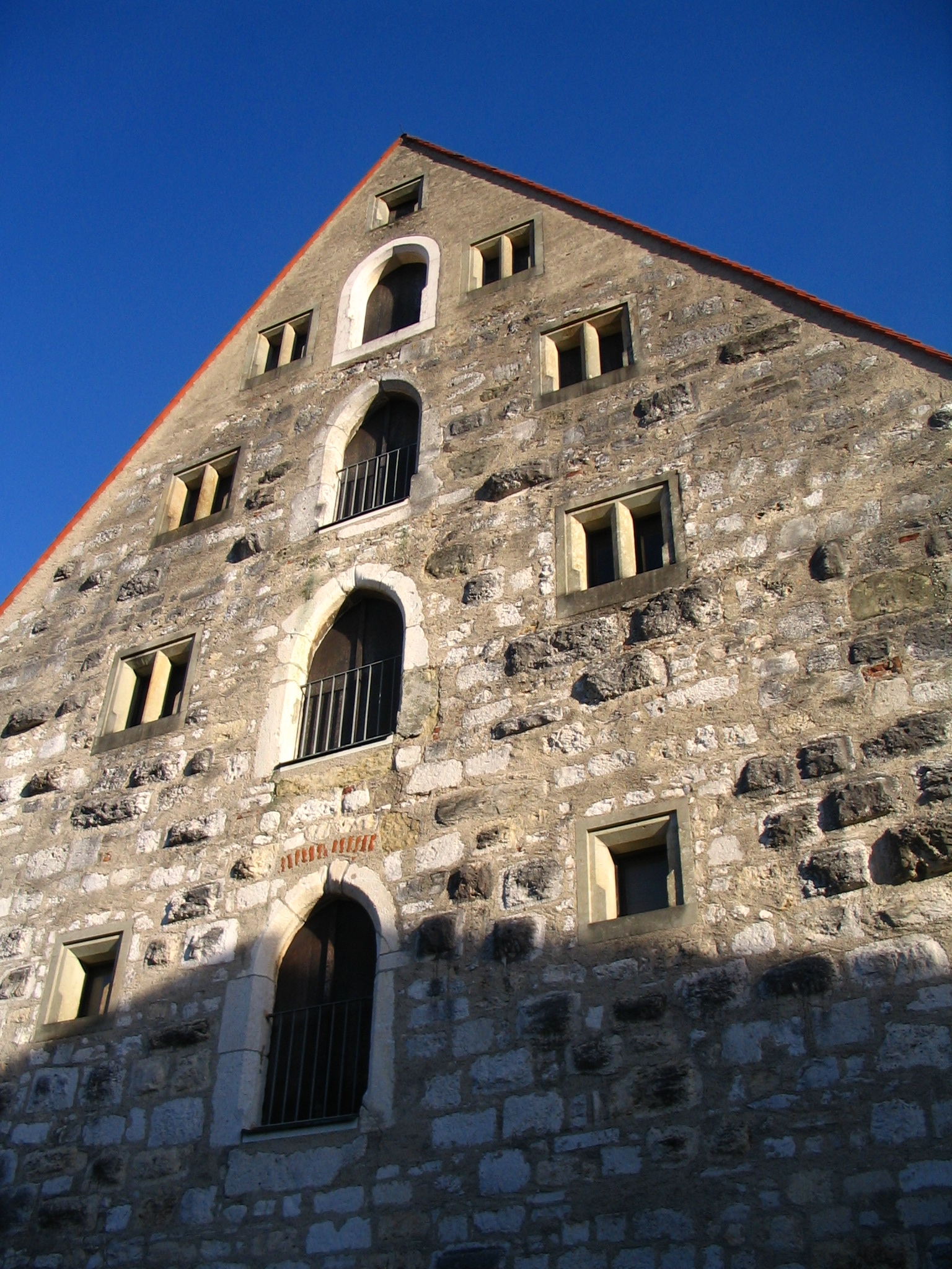 Stadt Kelheim, Niederbayern: Herzogkasten, städtischer Getreidespeicher aus dem 15. Jahrhundert; nun archäölogisches Museum